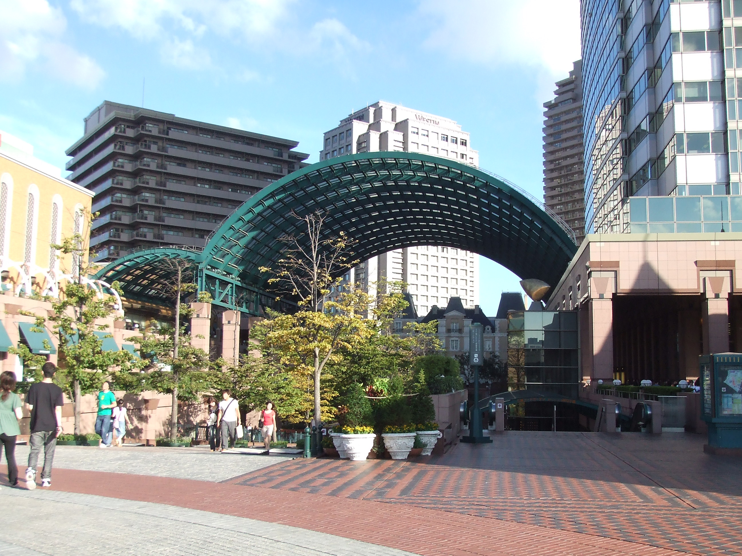 恵比寿ガーデンプレイス 中央広場